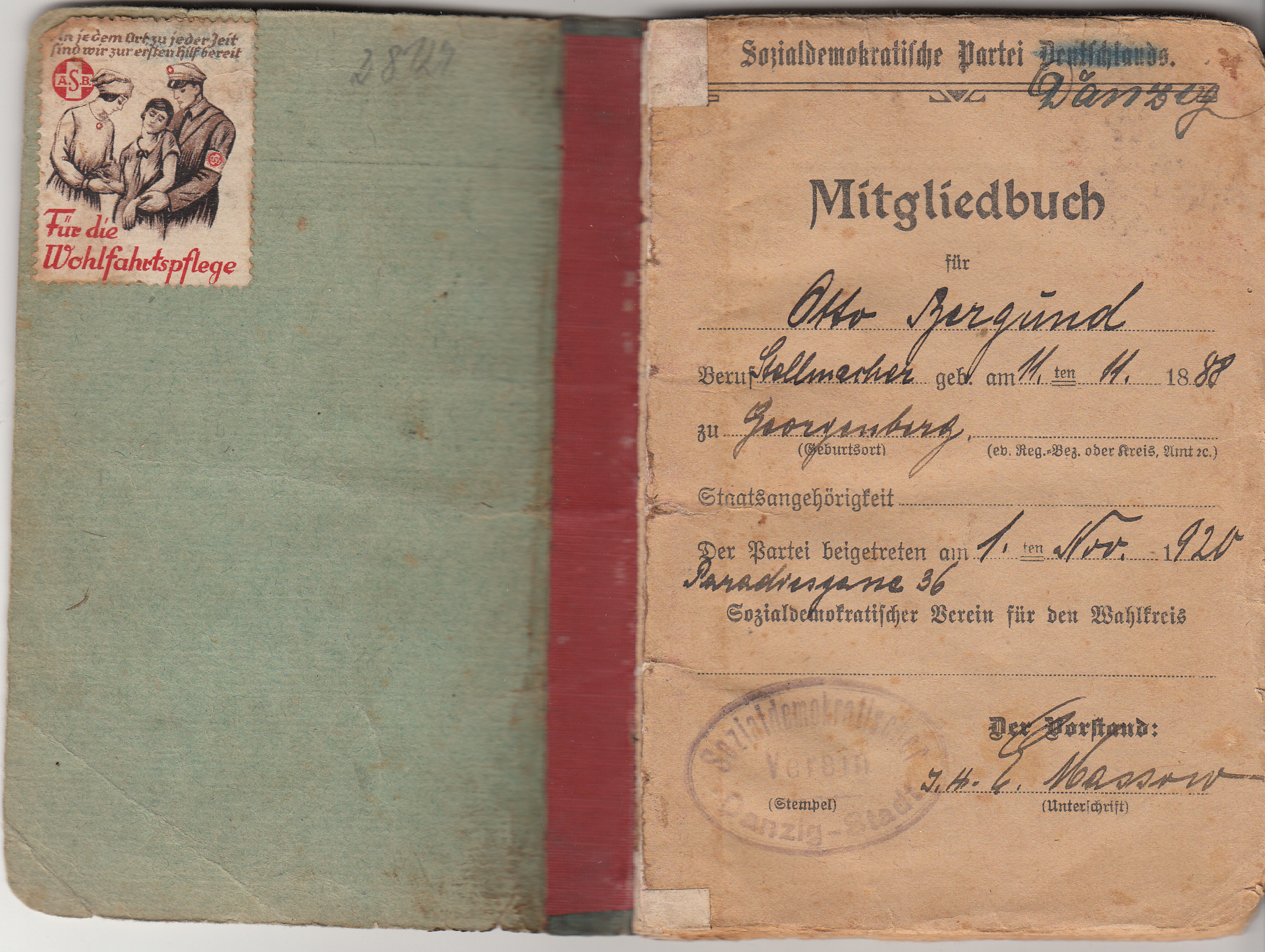 Mitgliedsbuch der Sozialdemokratischen Partei in Danzig